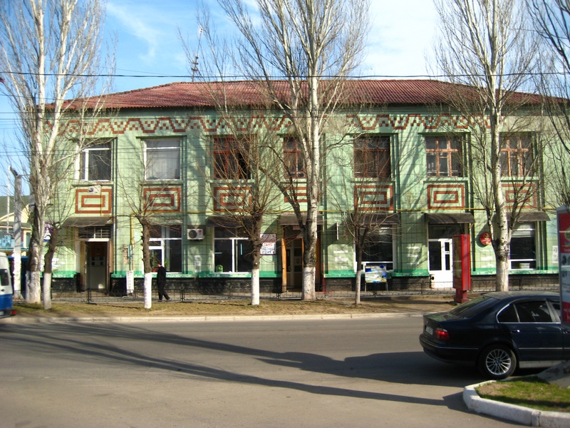 На этом месте располагалось здание старой синагоги.